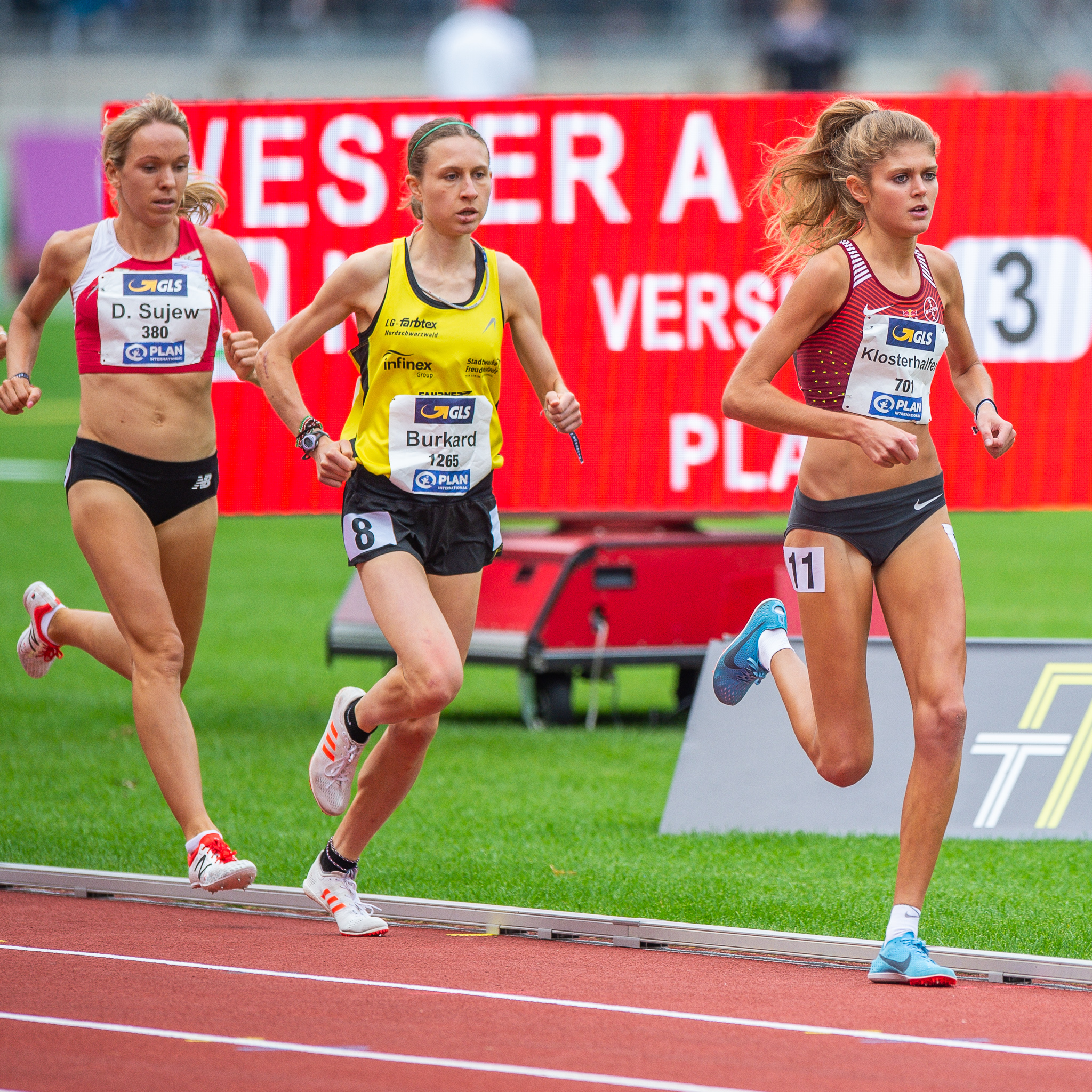 1500-Meter-Lauf,DLV,Deutsche Leichtathletik Meisterschaften 2018,Deutscher Leichtathletik-Verband,Diana Sujew,Elena Burkard,Konstanze Klosterhalfen,LG Eintracht Frankfurt,LG farbtex Nordschwarzwald,Max-Morlock-Stadion,TSV Bayer 04 Leverkusen